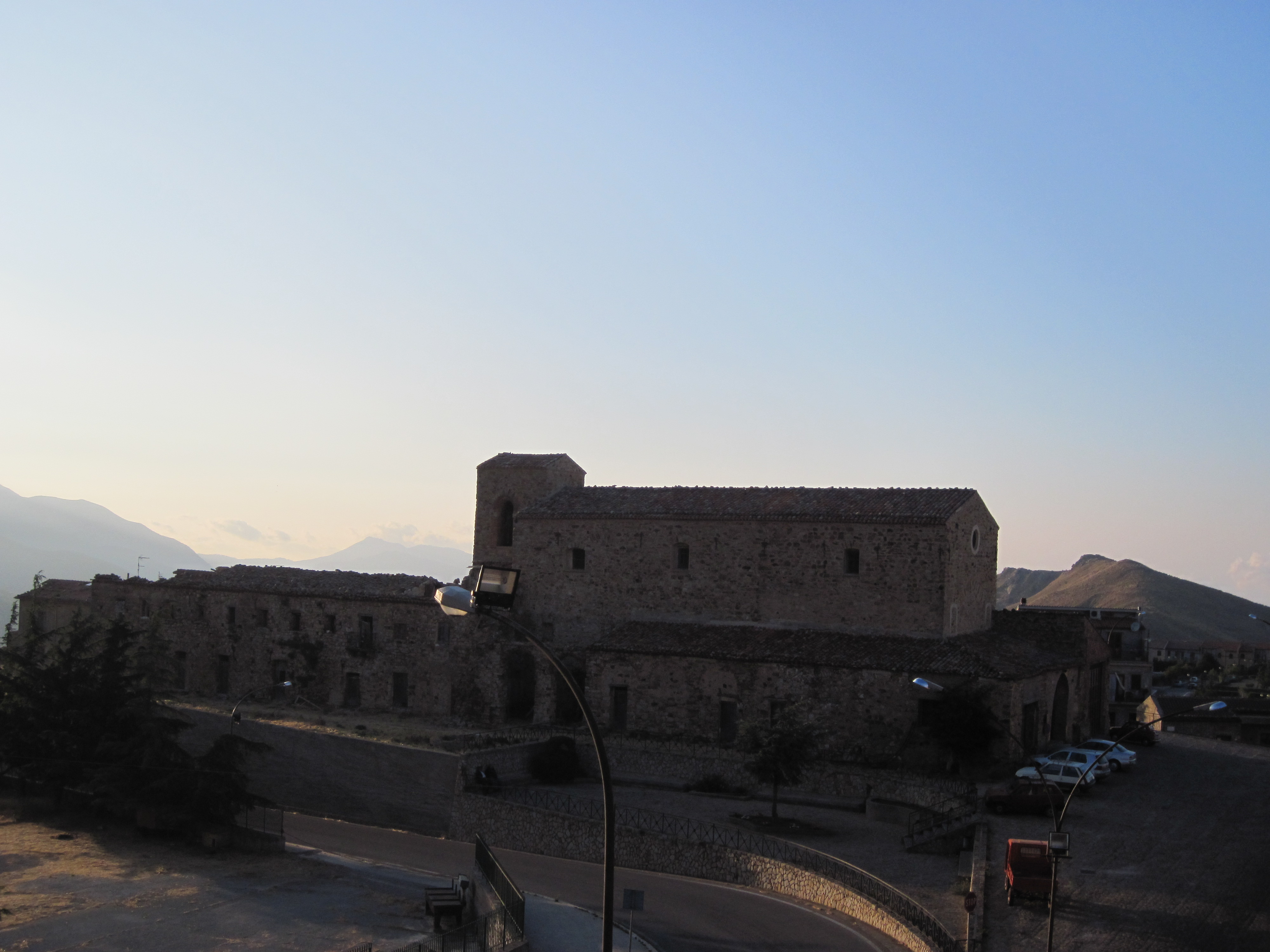 Piazza San Bartolomeo, Geraci Siculo (Pa)